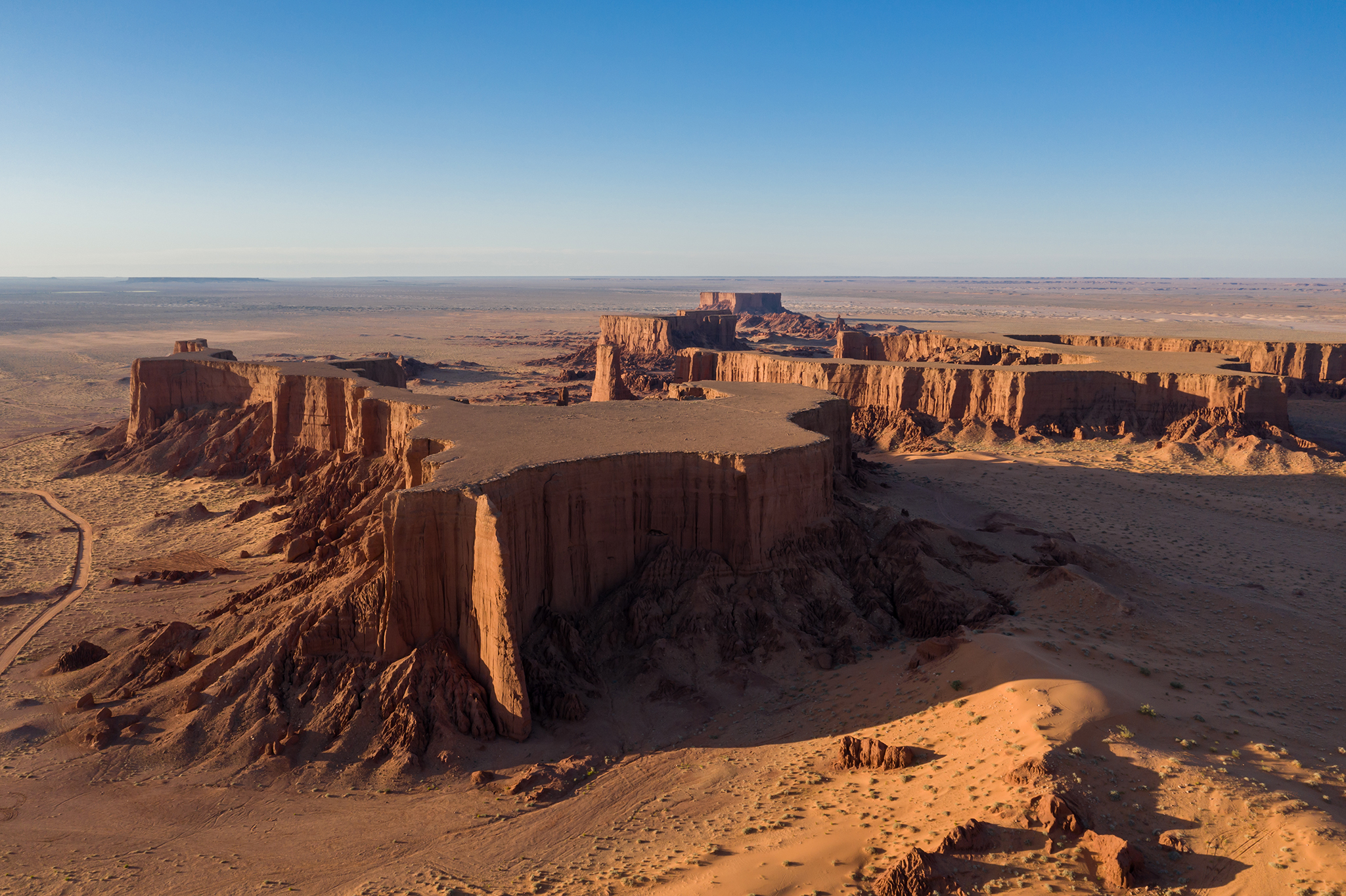 Une photo des montagnes d'el gorre sud de l'Algérie, wilaya d'el bayadh, plus exactement à Brezina.